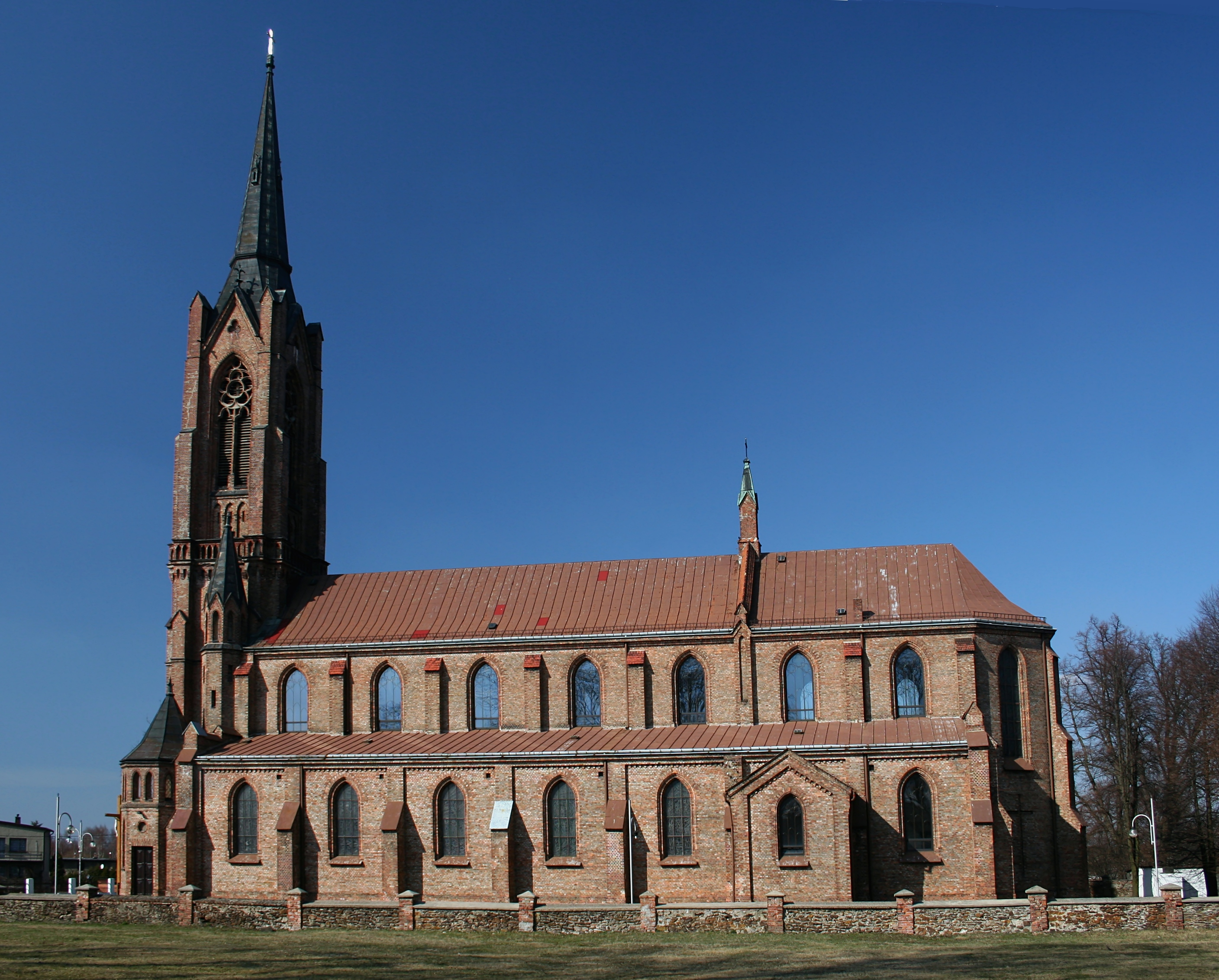 Kościół św. Walentego w Konopiskach